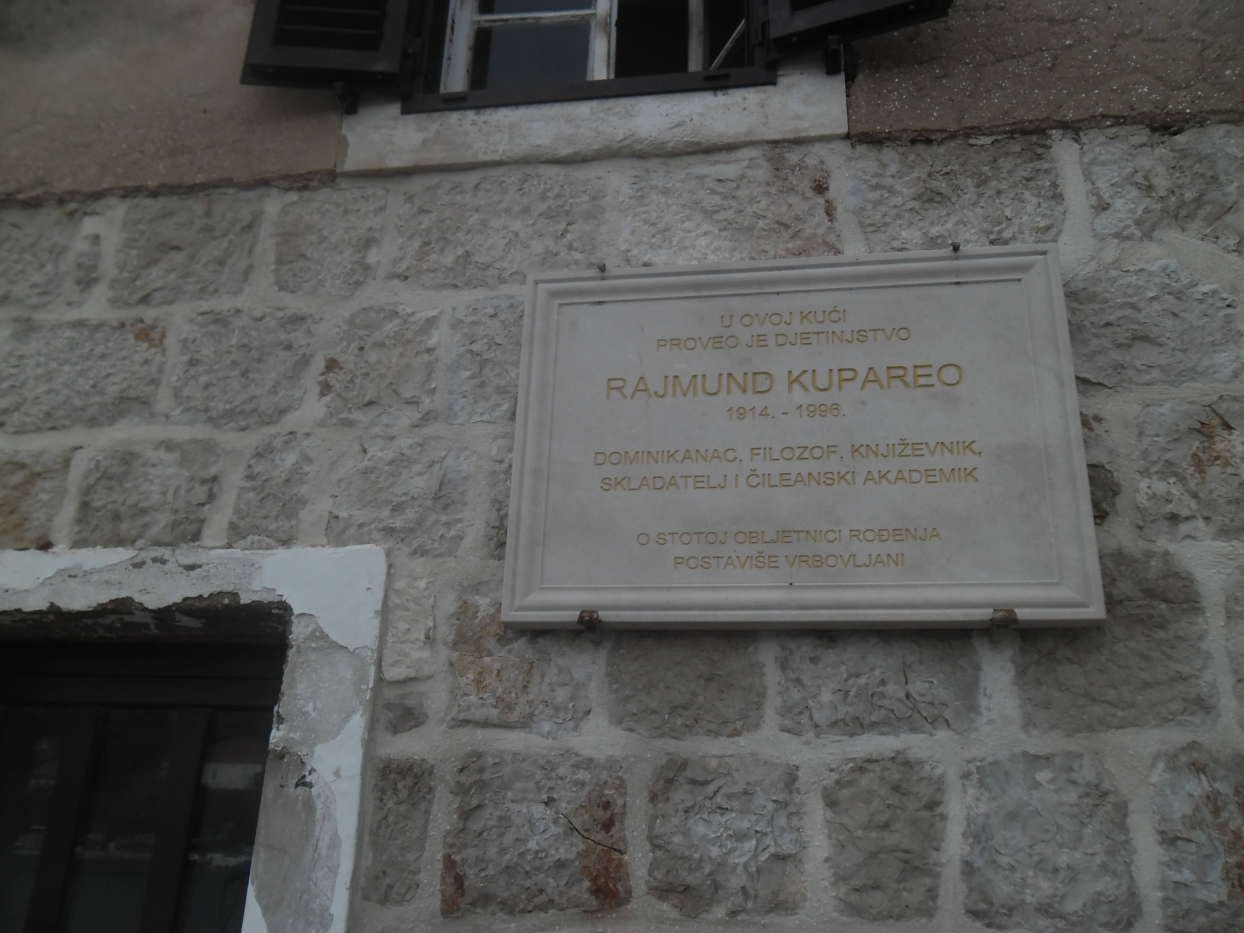 otok Hvar